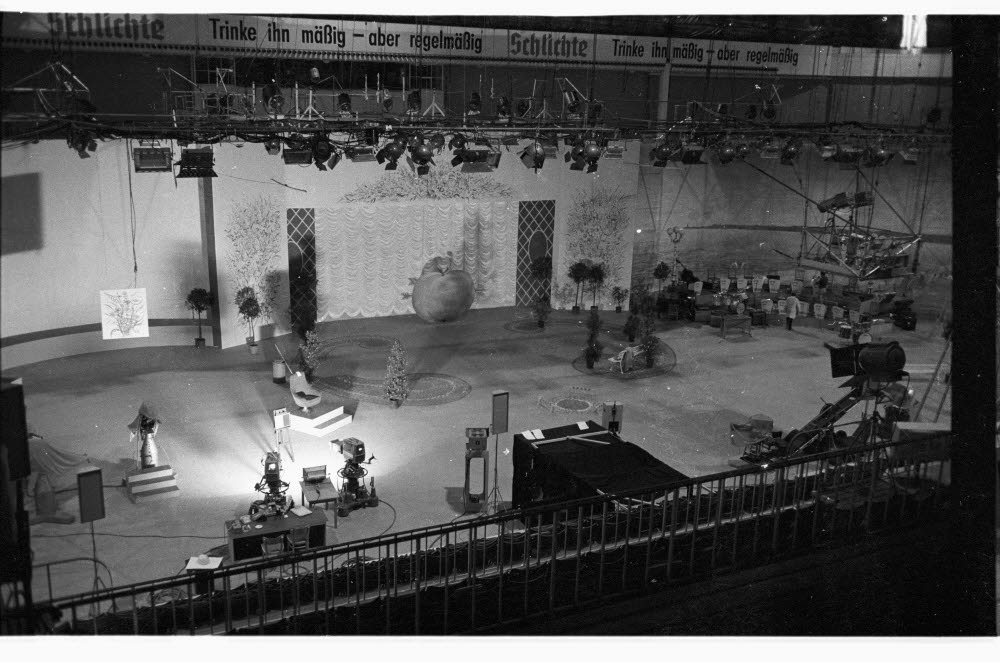 Vorbereitungen.